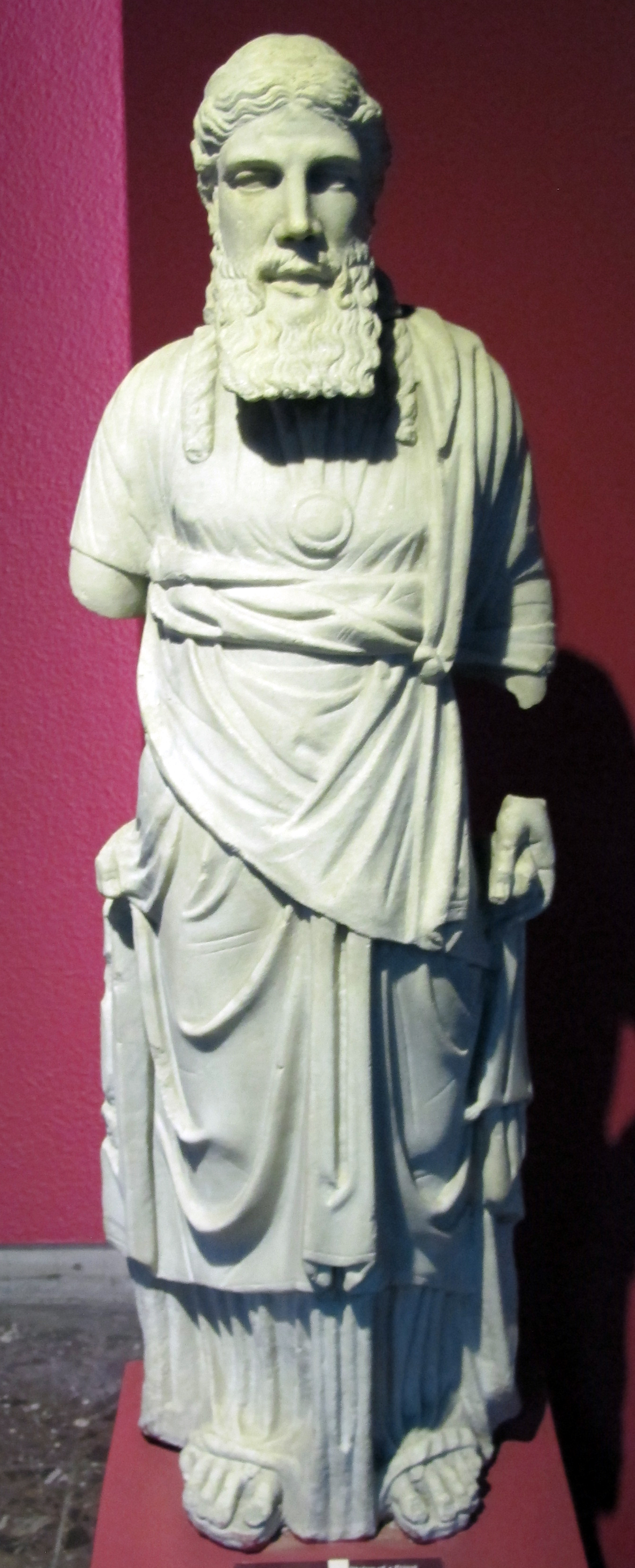 Arte romana, statua di sacerdote, 30 ac.-395 ca., da alicarnasso